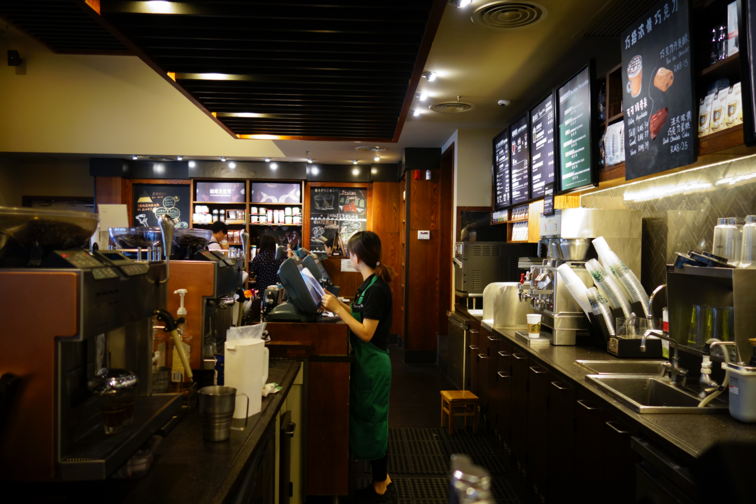 中文（中国大陆）: 星巴克武汉楚河汉街店